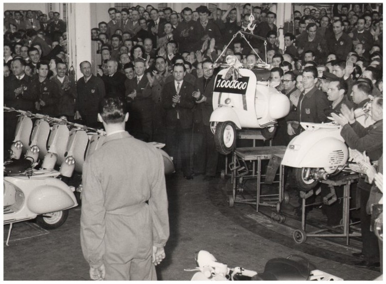 Festeggiamenti in occasione della milionesima Vespa della Piaggio, Pontedera (PI) 28 aprile 1956. L'evento fu celebrato anche con l'emissione di un francobollo. Il veicolo ebbe tale successo che fu esportato in circa 60 paesi (AS Pescara, Archivio privato D'Ascanio Corradino, b. 2, fasc. 32, n. 4 )